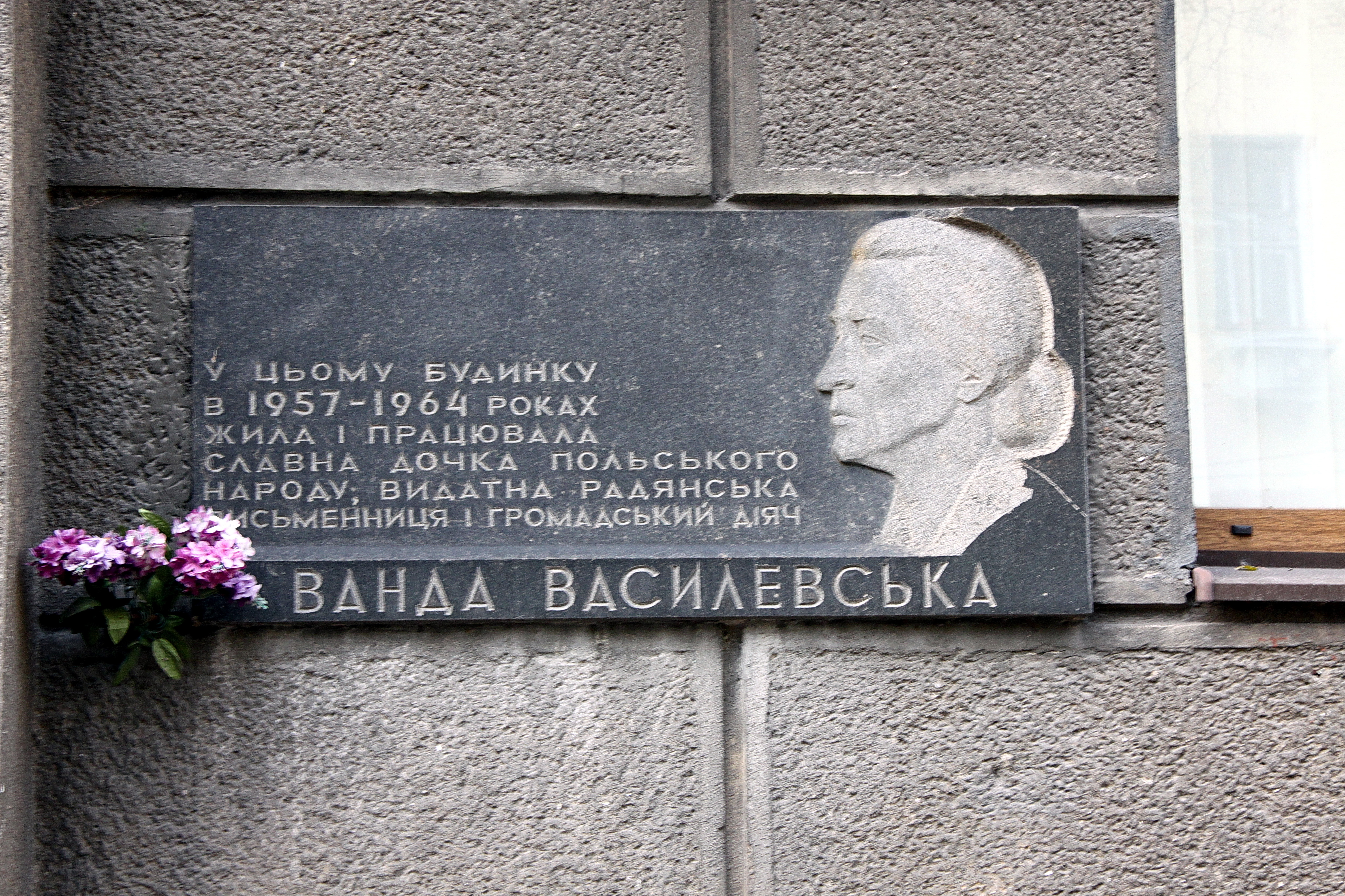 Будинок житловий працівників Ради народних комісарів УРСР, в якому мешкали: у 1957–1964 рр. Василевська В., письменниця; у 1935–1941 рр. Довженко О., кінорежисер; Корнійчук О. Є., драматург; у 1945–1963 рр. Пащенко О. С., графік, народний художник, Київ, Шовковична вул., 10